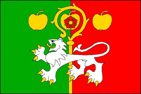 Vlajka obce Soběnov